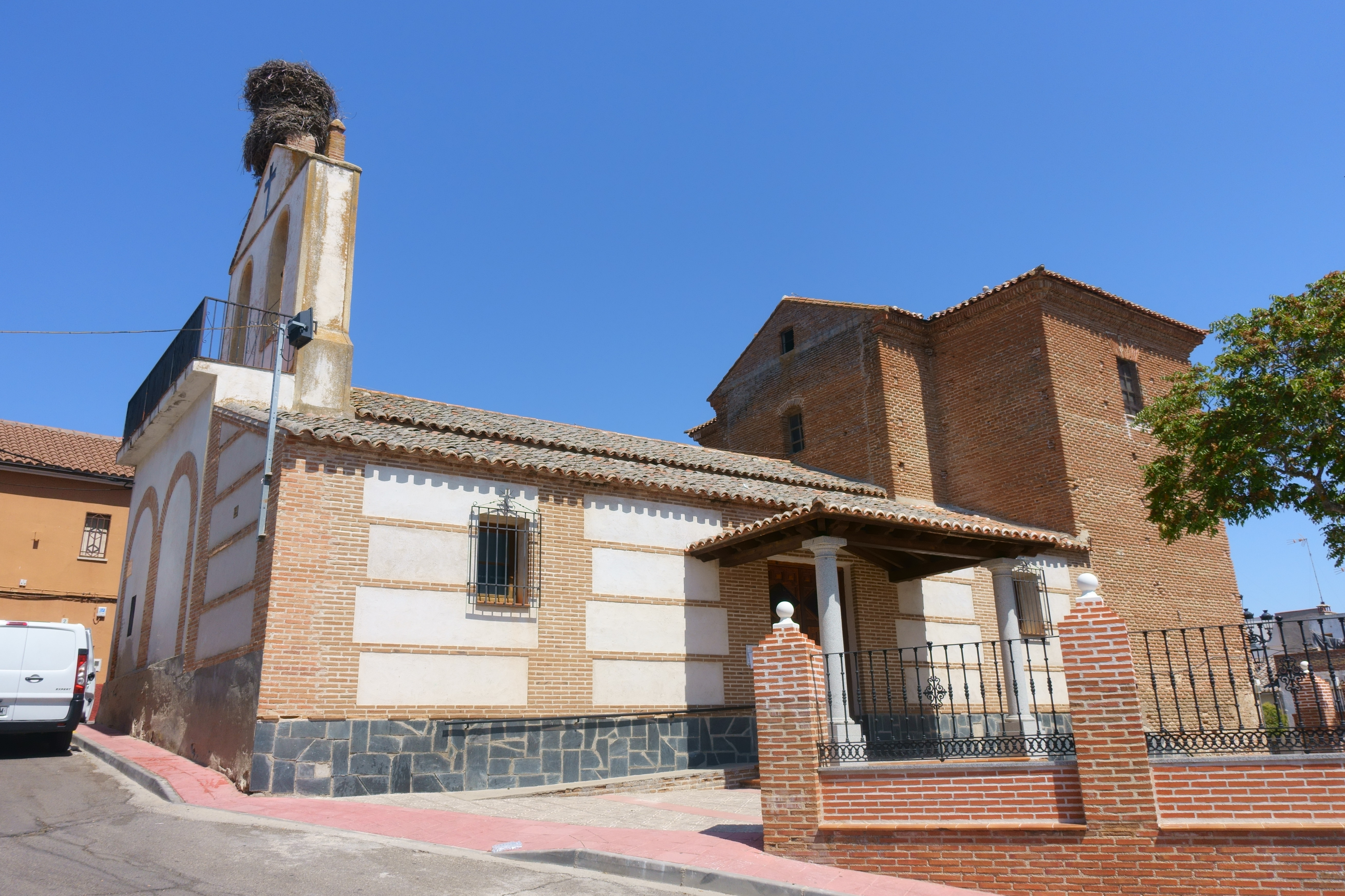 Iglesia de San Miguel Arcángel, Montearagón (Toledo, España).